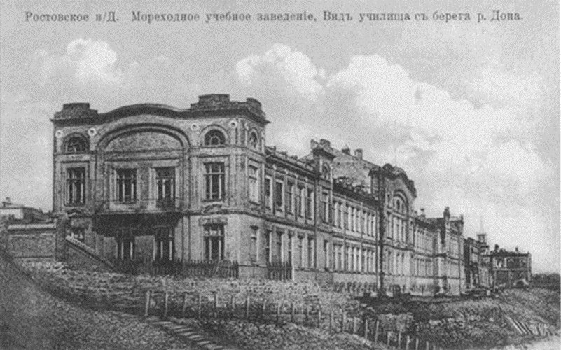 Ростовское мореходное училище.Вид с Дона